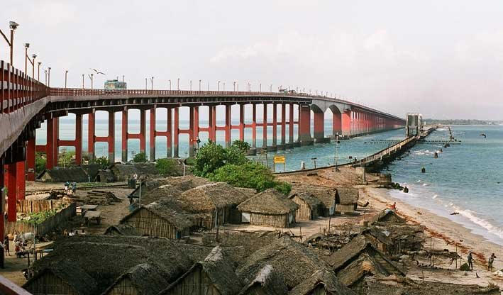 പാമ്പൻ പാലം